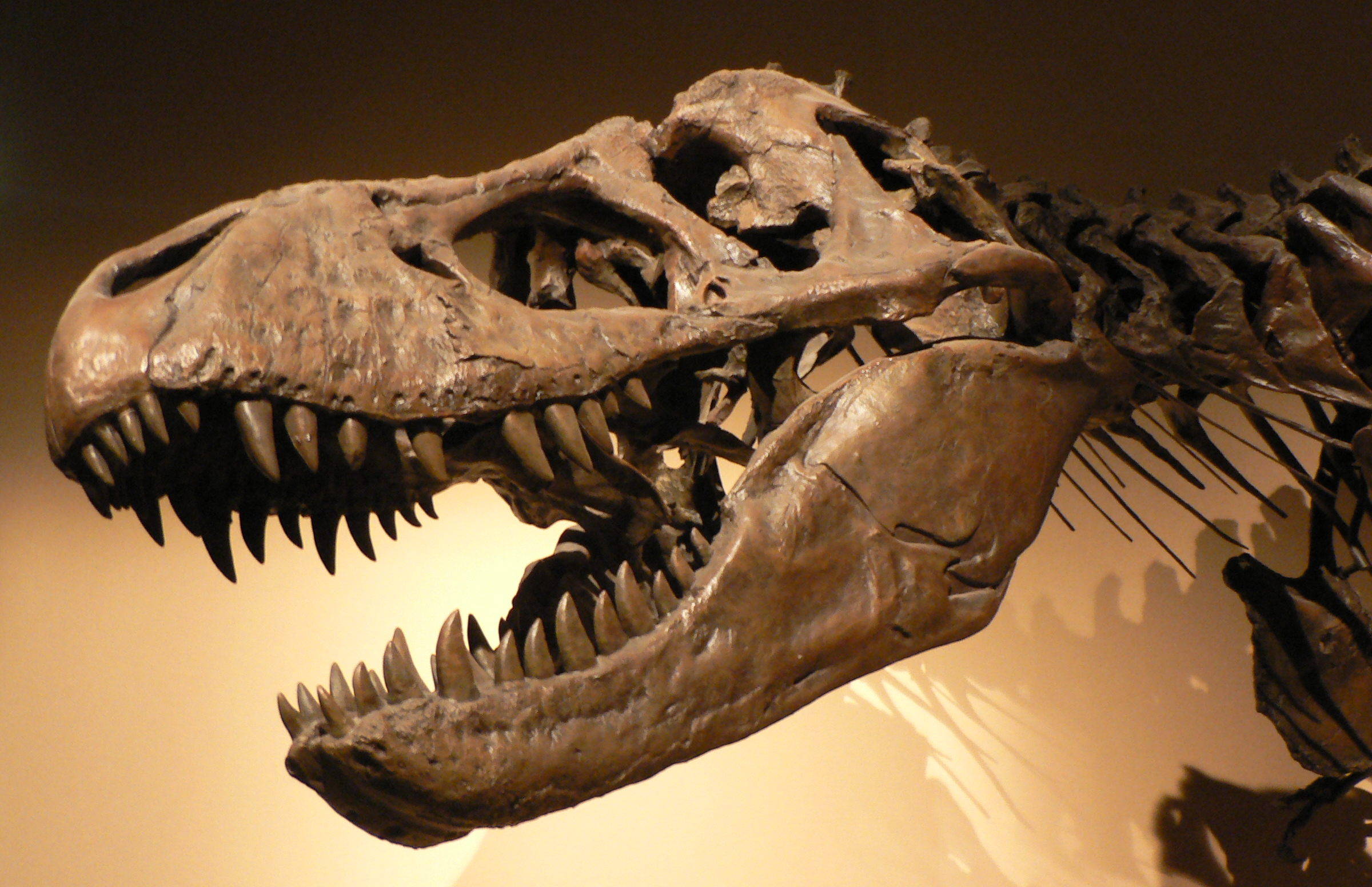 Tyrannosaurus rex, Palais de la Découverte, Paris